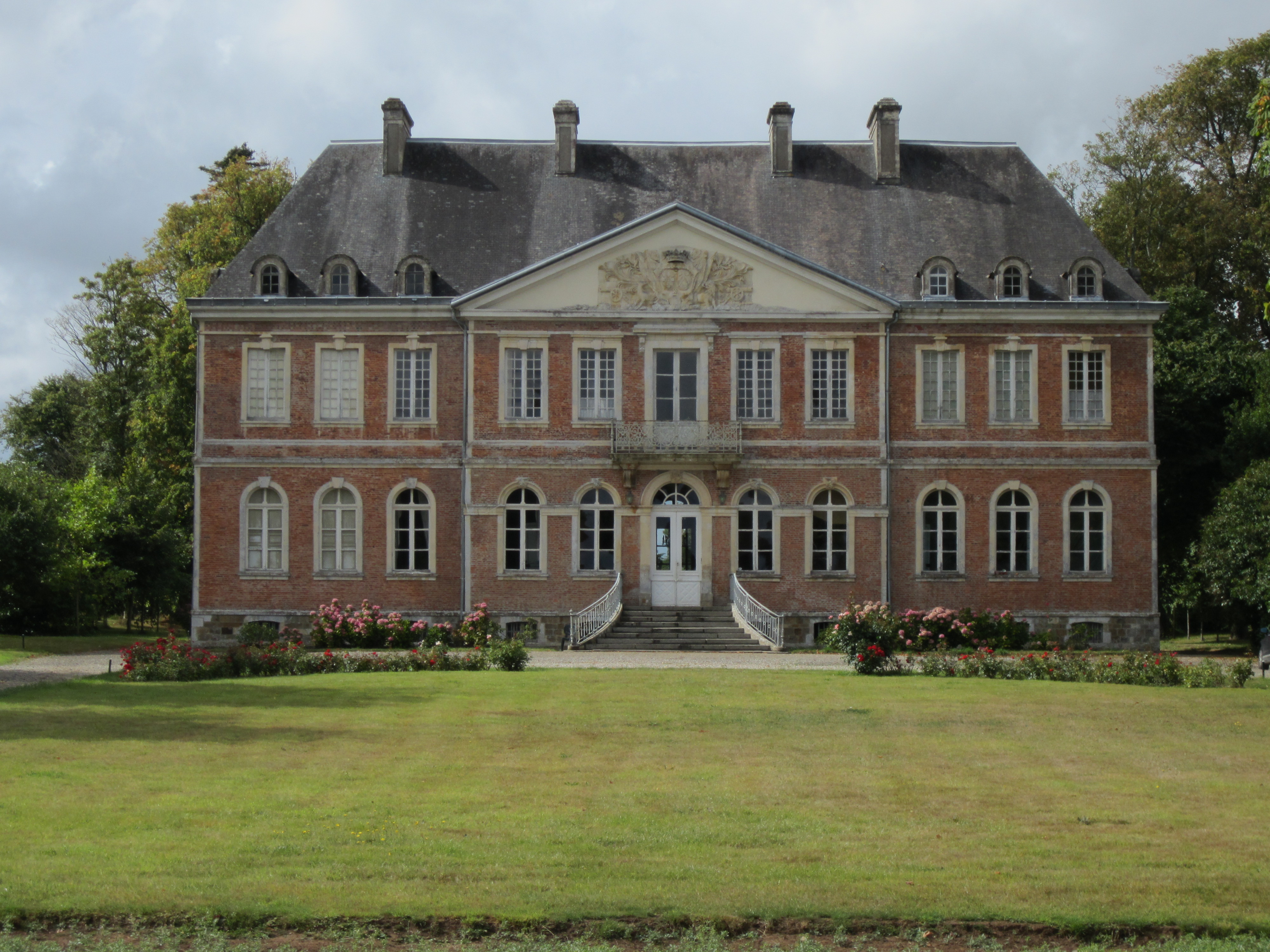 Prétot-Sainte-Suzanne, Manche